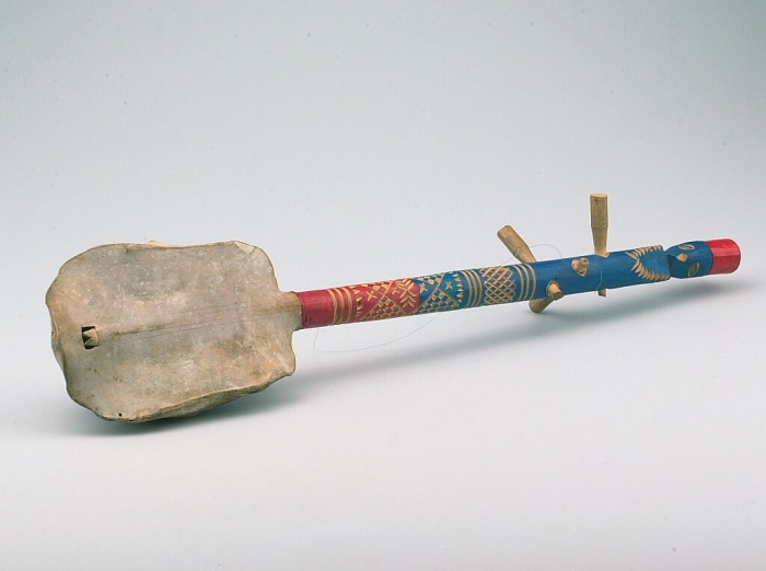 Deze drie-snarige getokkelde langhalsluit is een zg. 'binnenspiesluit': de hals loopt door de klankkast van een schildpadschild heen tot bijna aan het andere uiteinde. De nylon snaren lopen van de stempennen over een kam naar het uiteinde van de spies, die is ingekerfd in de vorm van een vork met tandjes, waaraan de snaren bevestigd worden. Dit is zichtbaar doordat er een gat in het klankbord van leer is gemaakt. De hals is blauw en rood geverfd, met geometrische inkepingen en bovenaan een mannenkopje met rode muts. Dit instrument is vermeodelijk voor toeristen gemaakt, want een professionnele muzikant 'Lotar speler ' gebruikt uitsluitende klankkasten van hout en zelden van schildpad. (De snaren en de kam ontbreken; het instrument ziet er ongebruikt uit.).